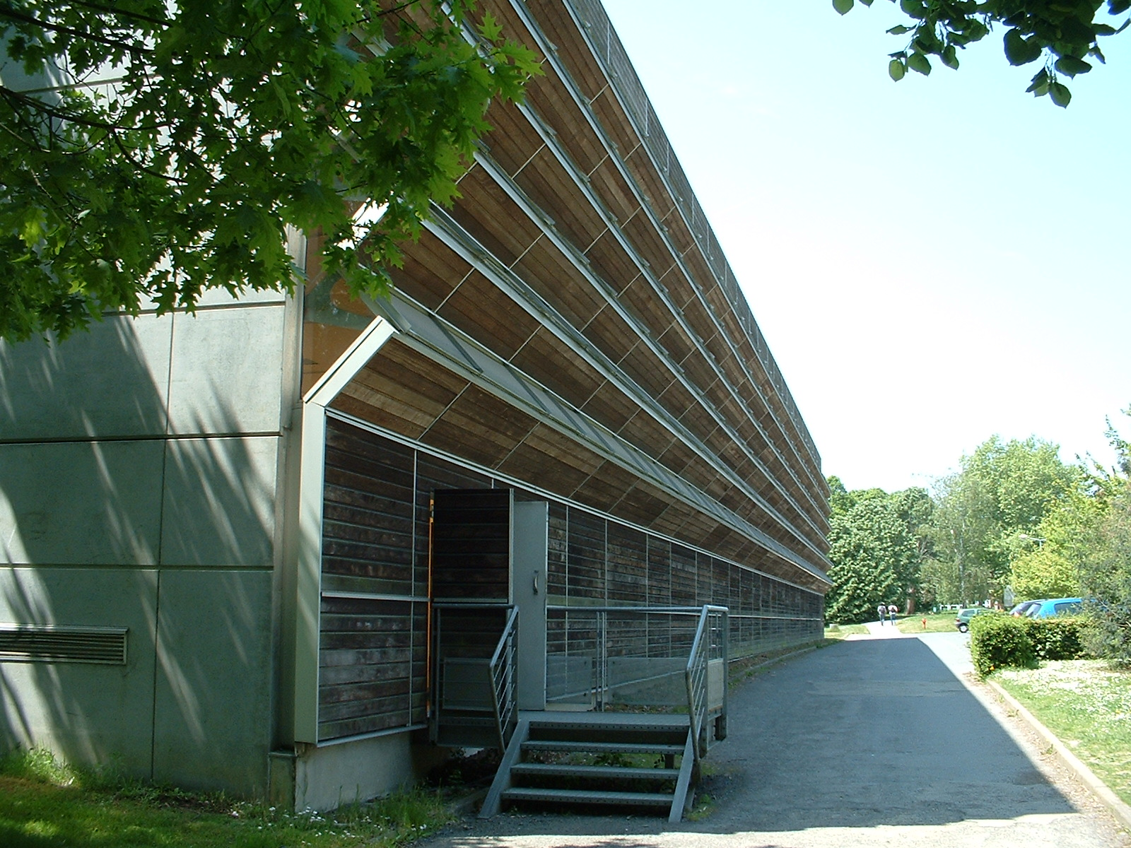 Nantes (France) - Lycée La Colinière - Vue du gymnase